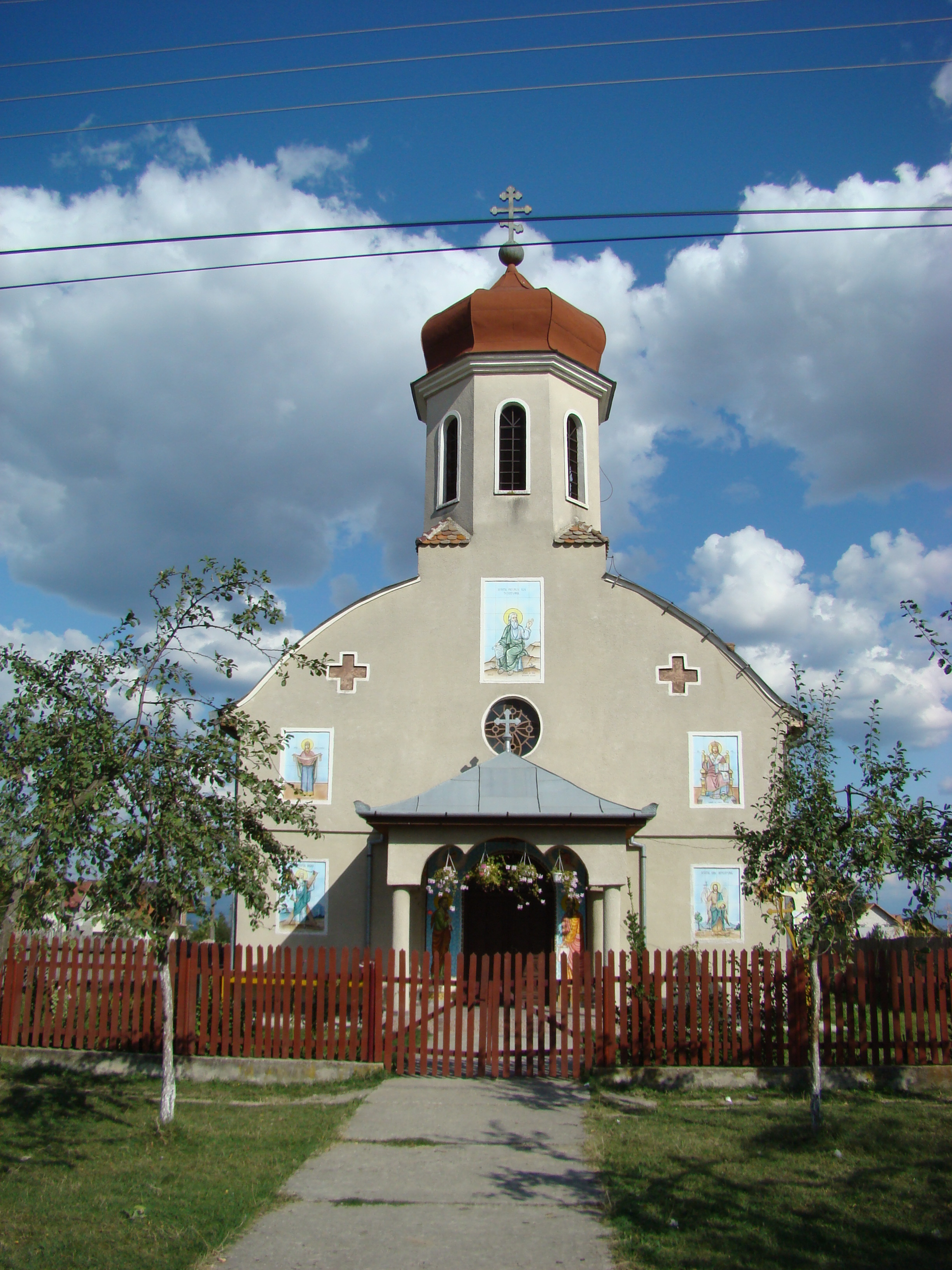 Biserica ortodoxă din Știuca, Timiș